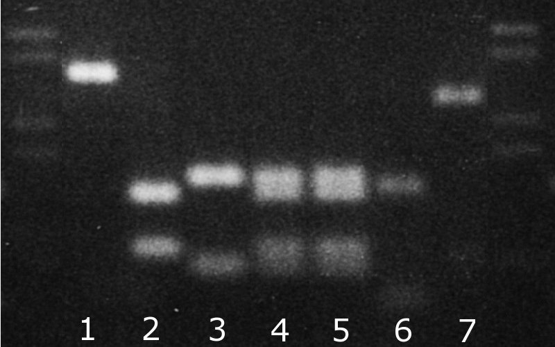 eigene Arbeit, eigene Aufnahme, elektronisch nachbearbeitet (Ausschnitte)